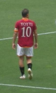 Francesco Totti